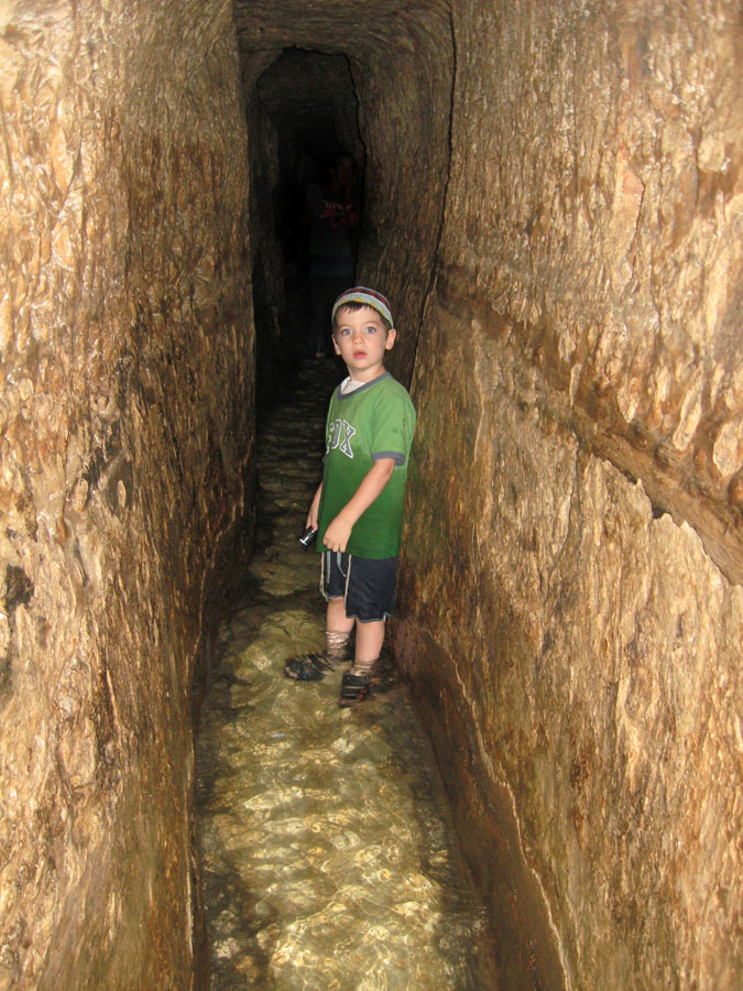 Hezekiah's Tunnel נקבת השילוח